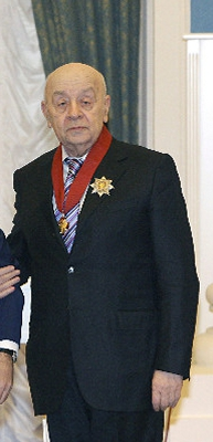 Леонид Броневой